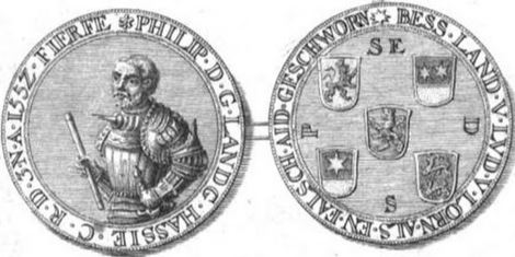 Hessischer Philippstaler von 1552 aus Köhlers Münzbelustigung von 1729